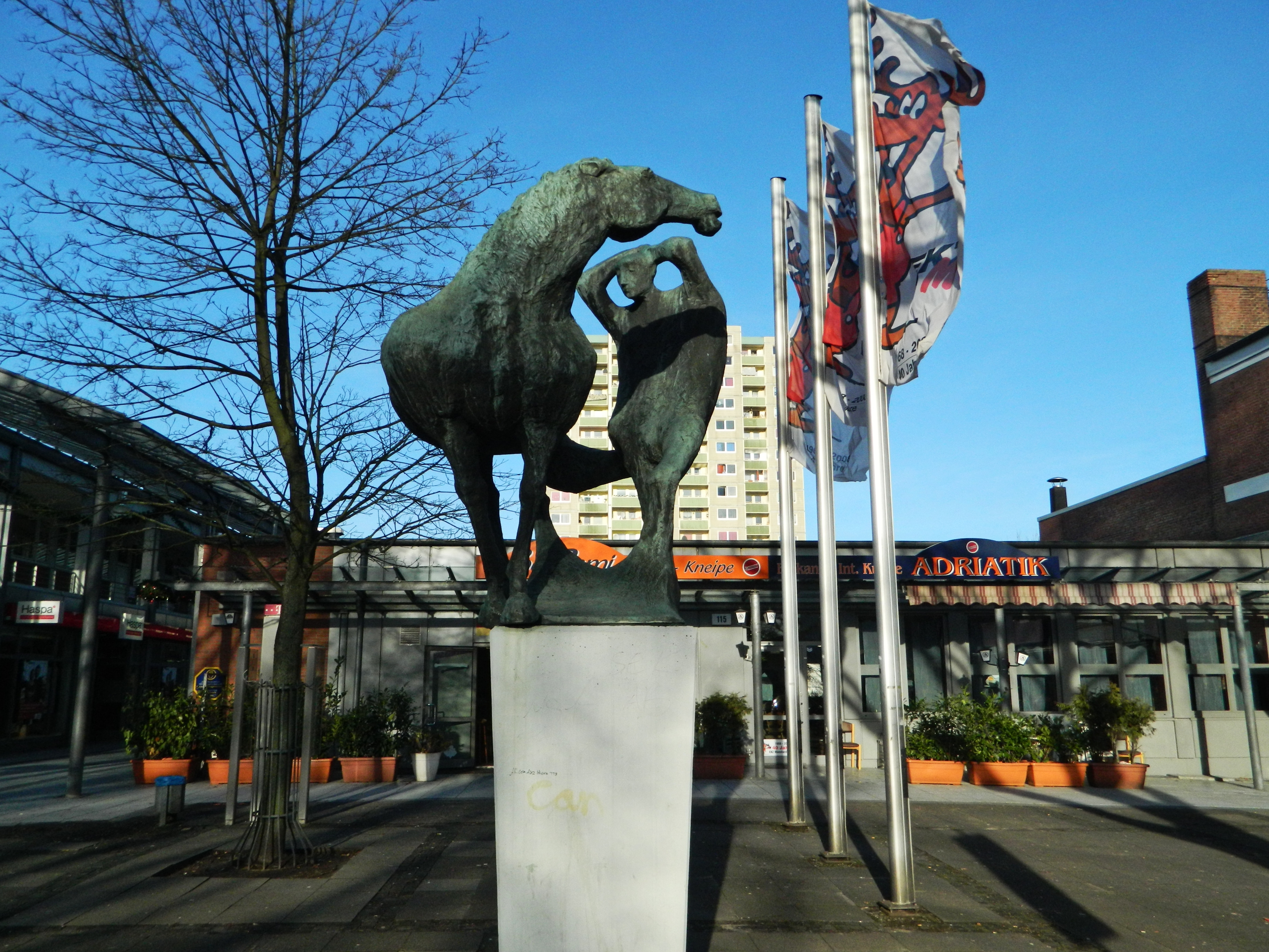 Horn, Hamburg, Germany. Mann und Pferd von Karl hein Engelin, 1963, Bronze, Manshardtstraße 115